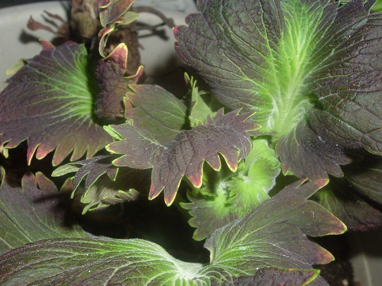 Coleus exotic plant